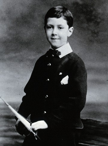 Henry Hallett Dale.